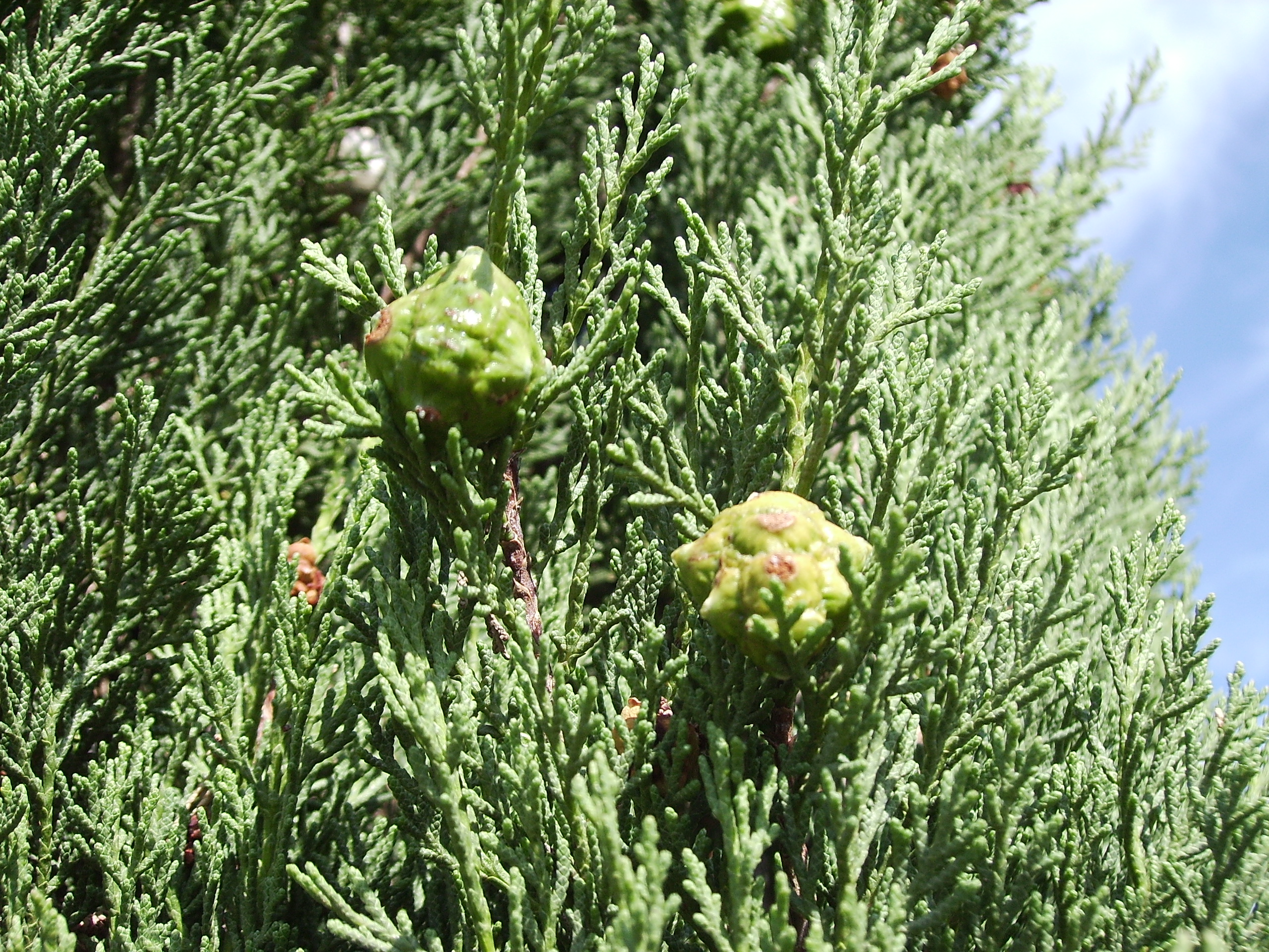 Cupressus sempervirens cones.